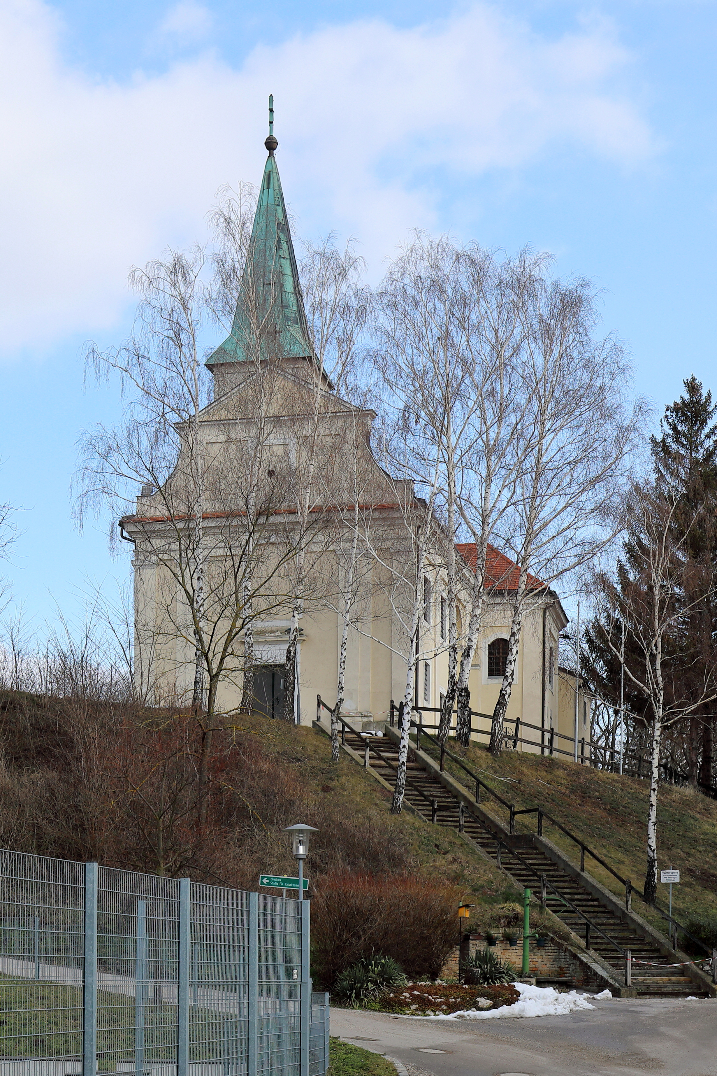 Westsüdwestansicht der röm.-kath. Pfarrkirche hl. Martin in der niederösterreichischen Marktgemeinde Spannberg. Eine im Kern mittelalterliche Kirche, die in der Barockzeit umgebaut und erweitert wurde.